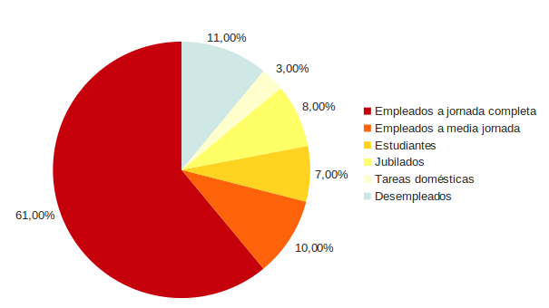 Fuente. Encuesta efectuada a aproximadamente 17.492 miembros de NA y publicados material interno: Narcóticos Anónimos (2006). «Información sobre NA». California: Narcotics Anonymous World Services. Consultado el 3 de enero de 2013.